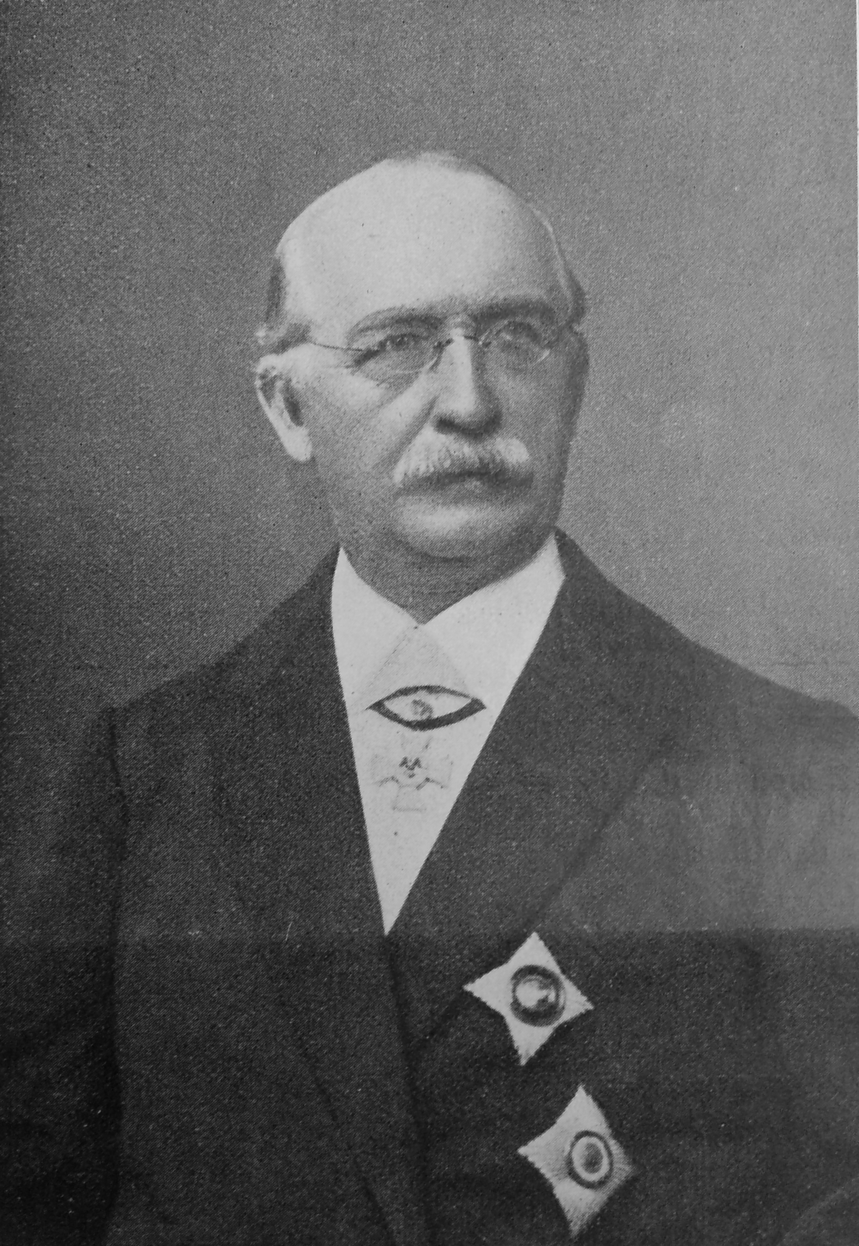 Scann aus der Zeitschrift für Bauwesen 1905